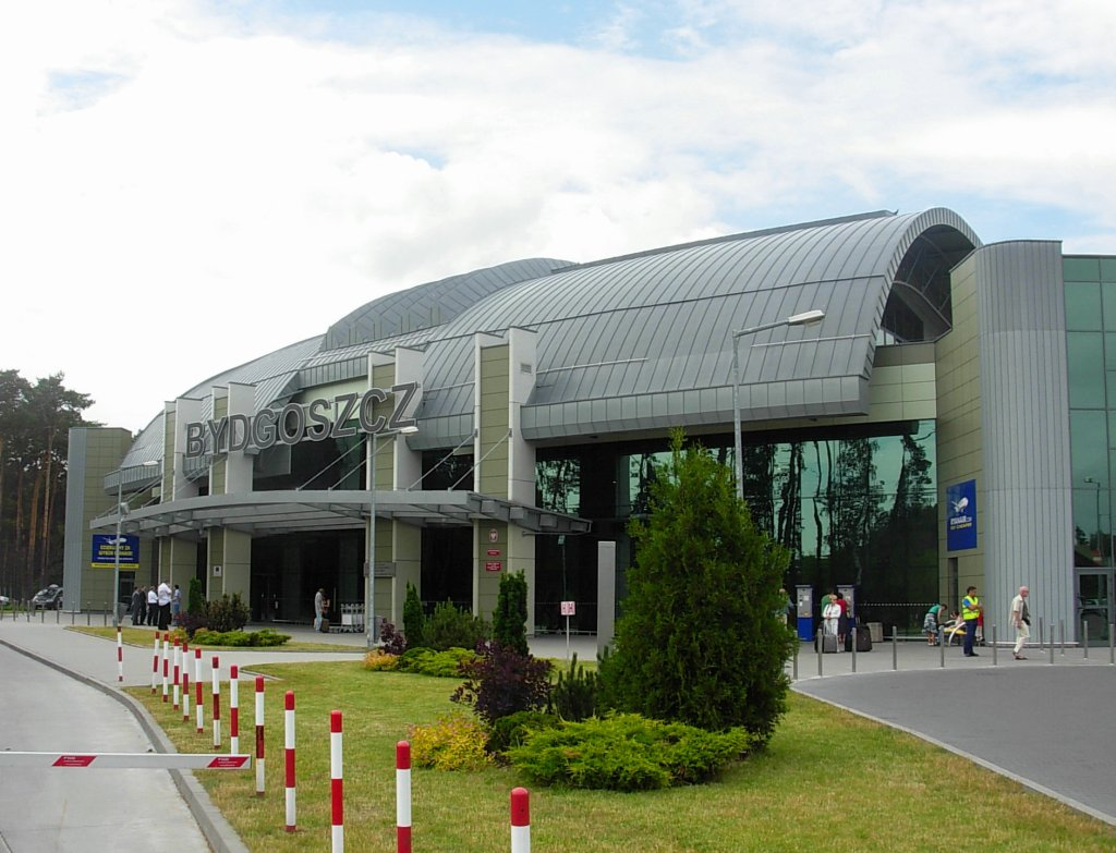 Terminal pasażerski portu lotniczego Bydgoszcz